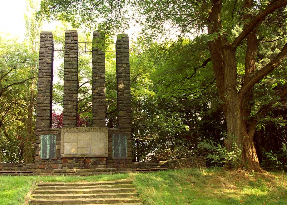 Ehrenmal in Witten-Heven, ursprünglich errichtet für die im Ersten Weltkrieg getöteten Hevener, später erweitert für die Gefallenen des Zweiten Weltkriegs.